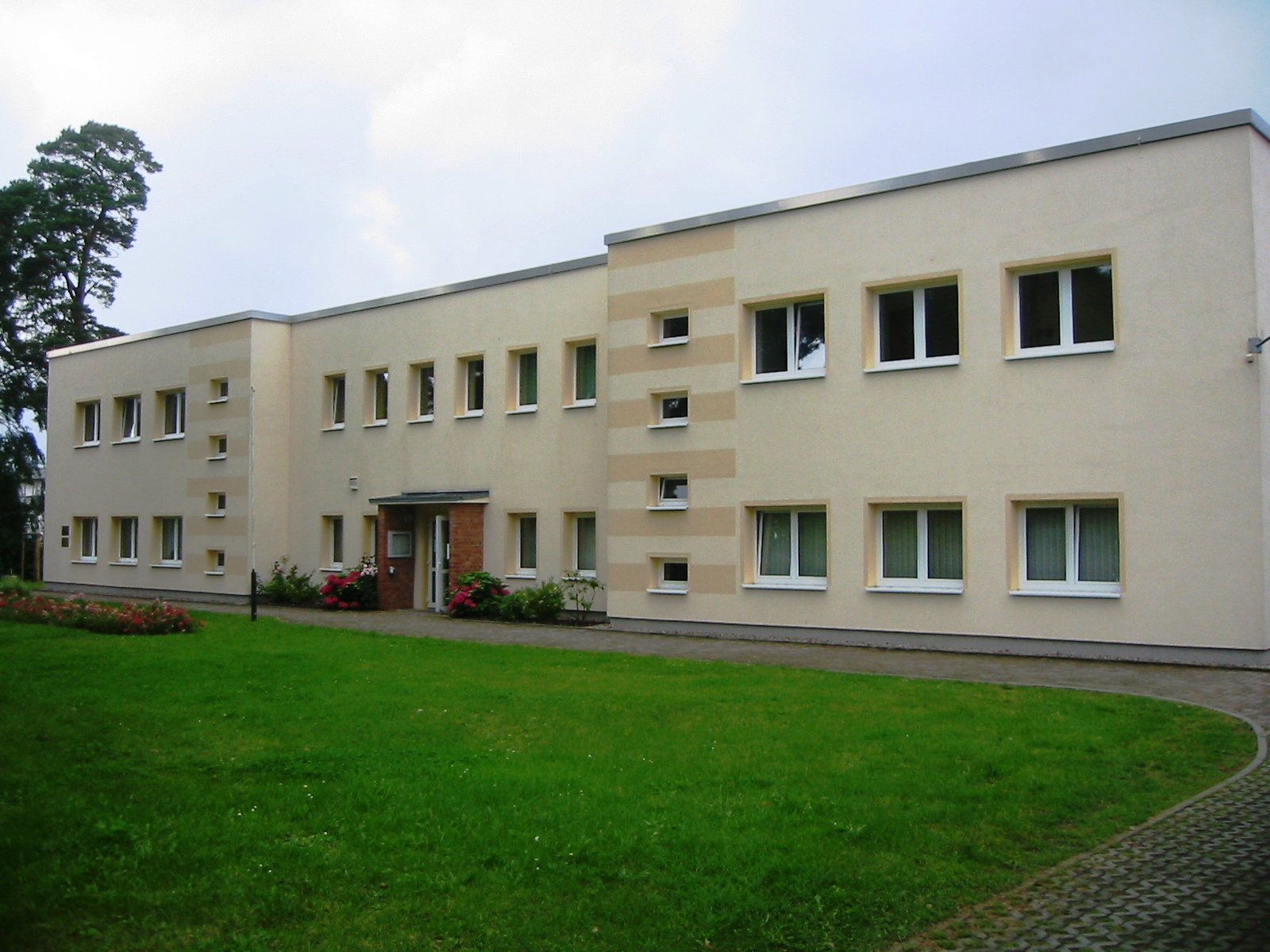 Amt Lubmin in Lubmin, einer Gemeinde im Landkreis Ostvorpommern